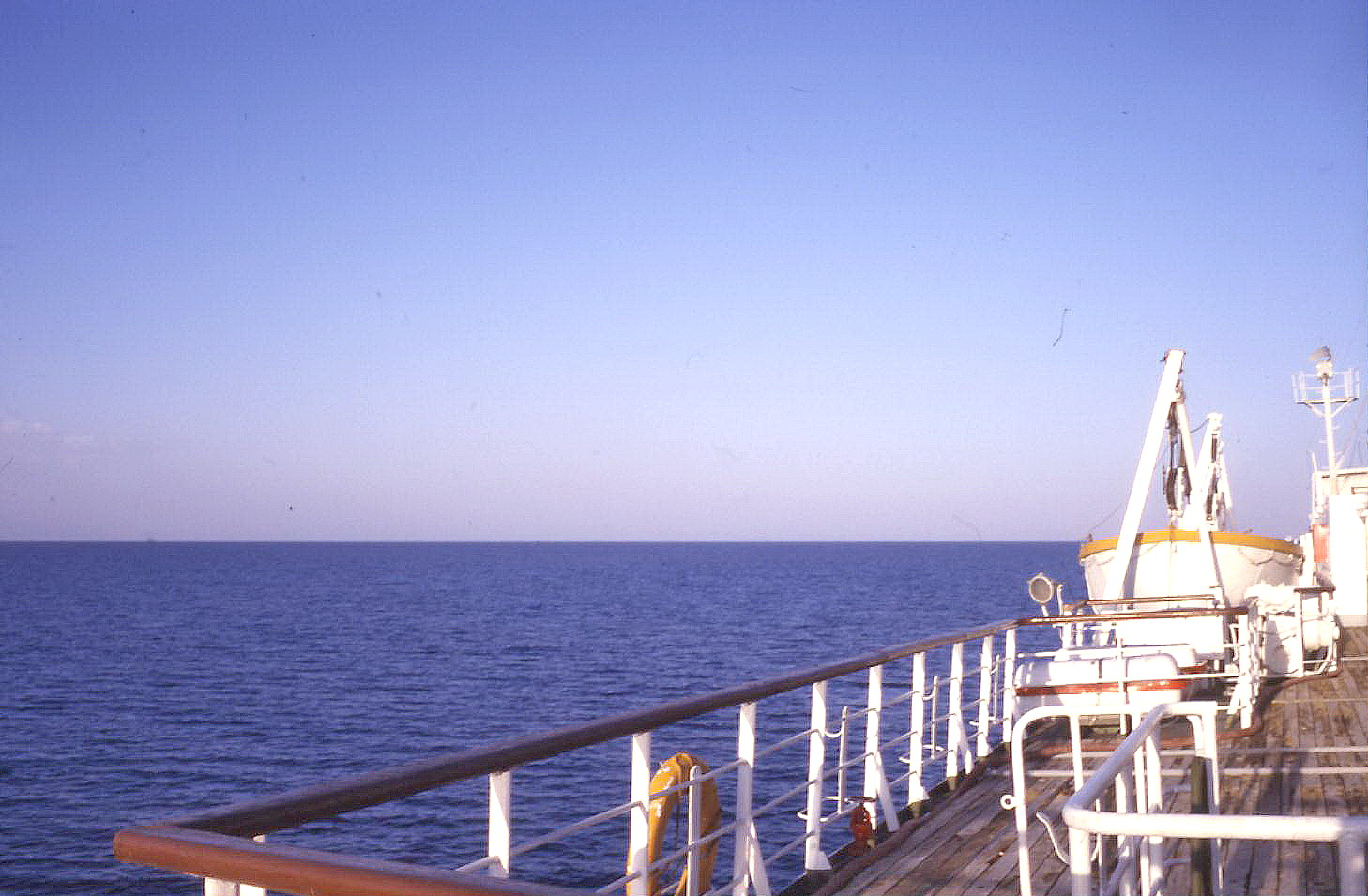 Vue du lac de Van du ferry-boat